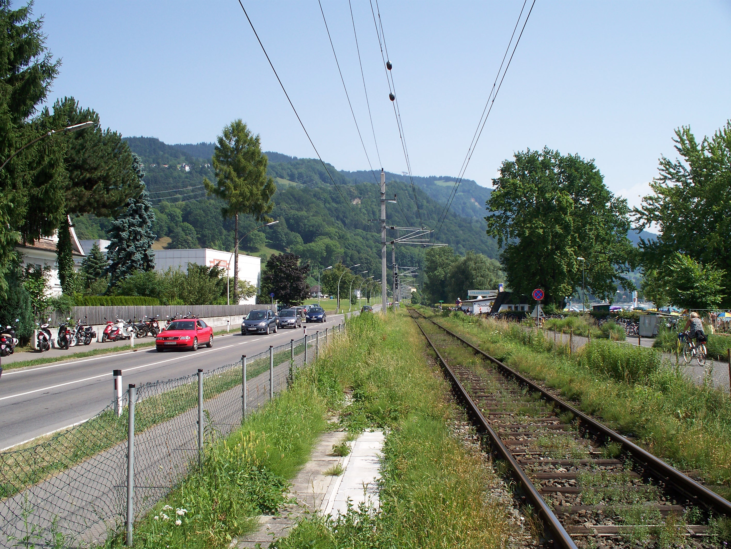 Die Lindauerstraße neben dem Bahngleis nach Bregenz bei Lochau, Vorarlberg, Österreich.